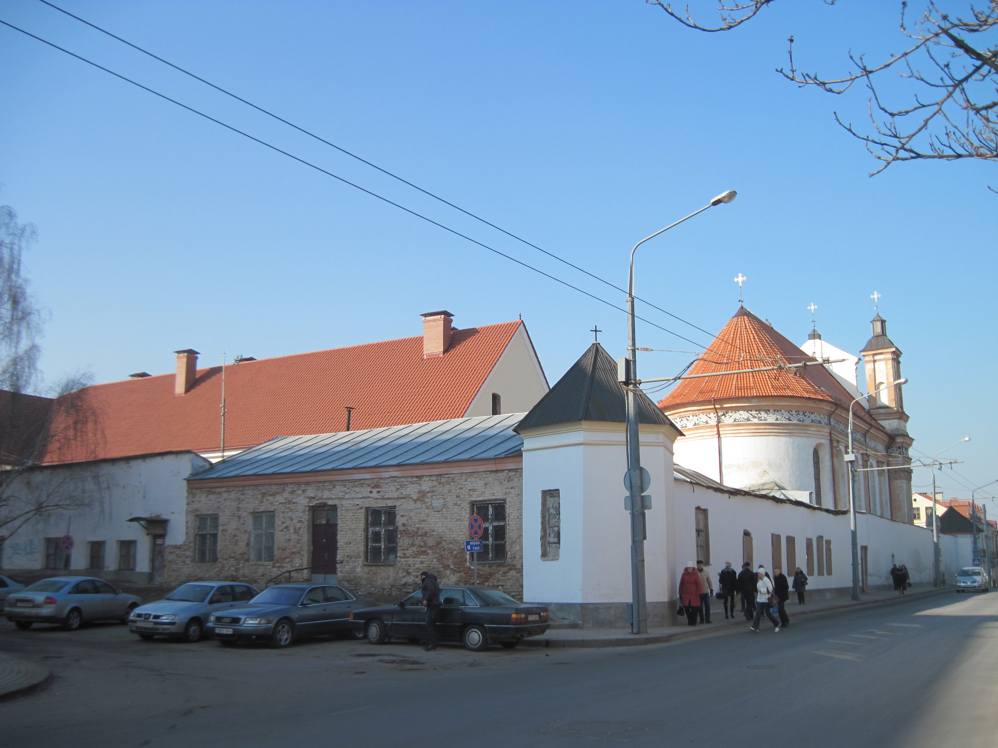 Забудова гістарычнага цэнтра Гродна. Вуліца Маркса, 27. Кляштар брыгітак разам з касцелам Дабравешчання Найсвяцейшай Дзевы Марыі. Выгляд з боку аўтавакзала.